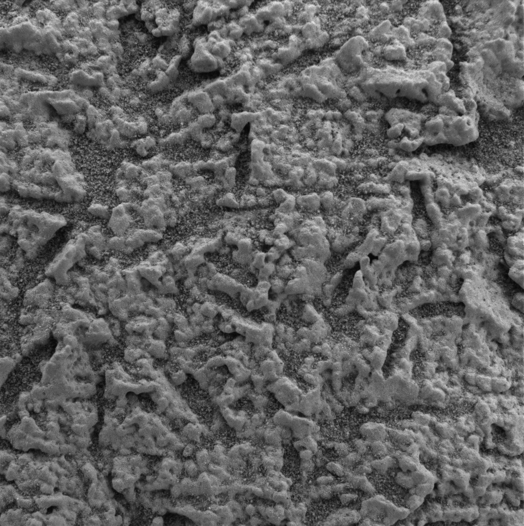 Microcavités vues par la caméra microscope du rover Opportunity à la surface d'un rocher sur Mars.